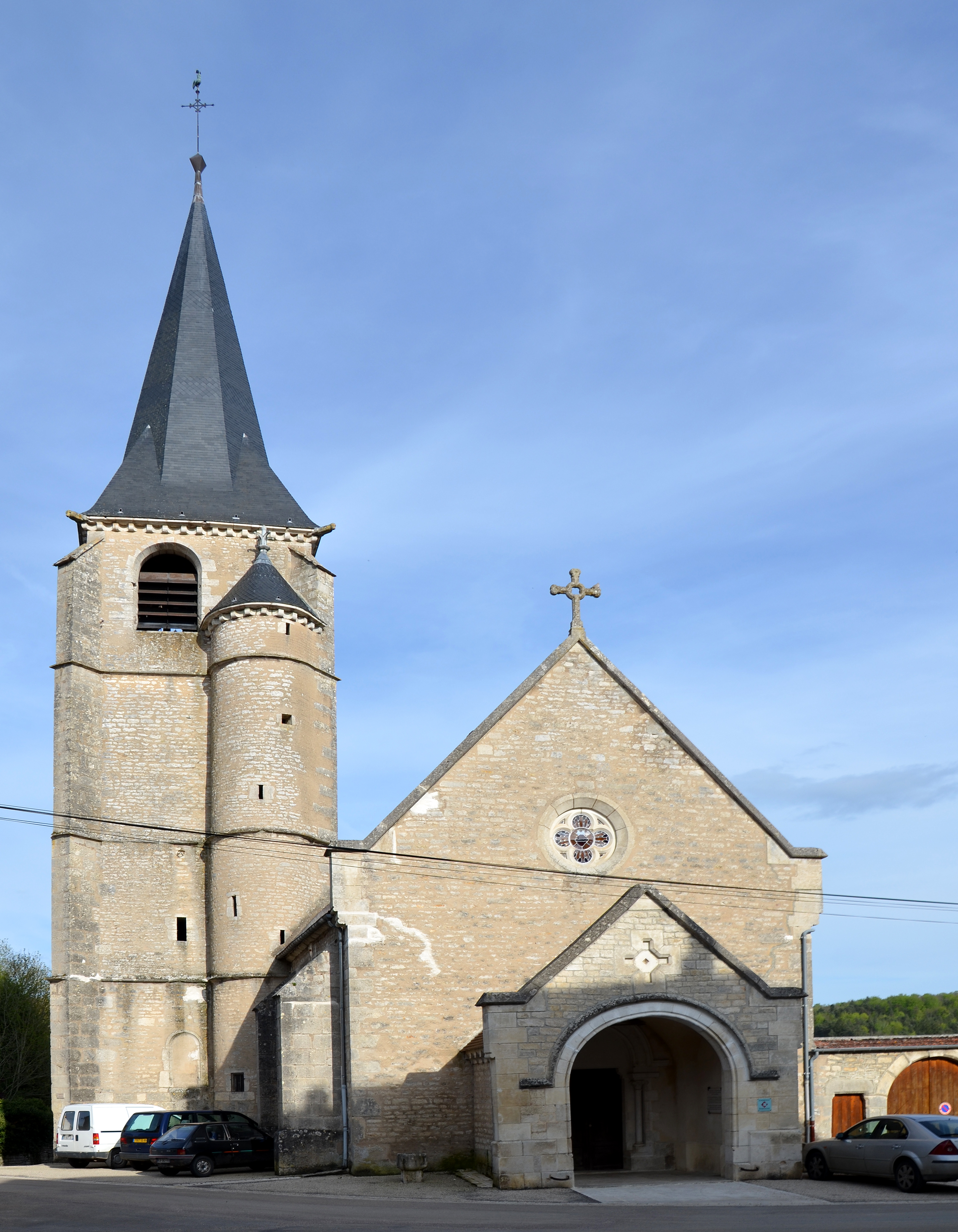 Église de Cry-sur-Armençon, Yonne, France